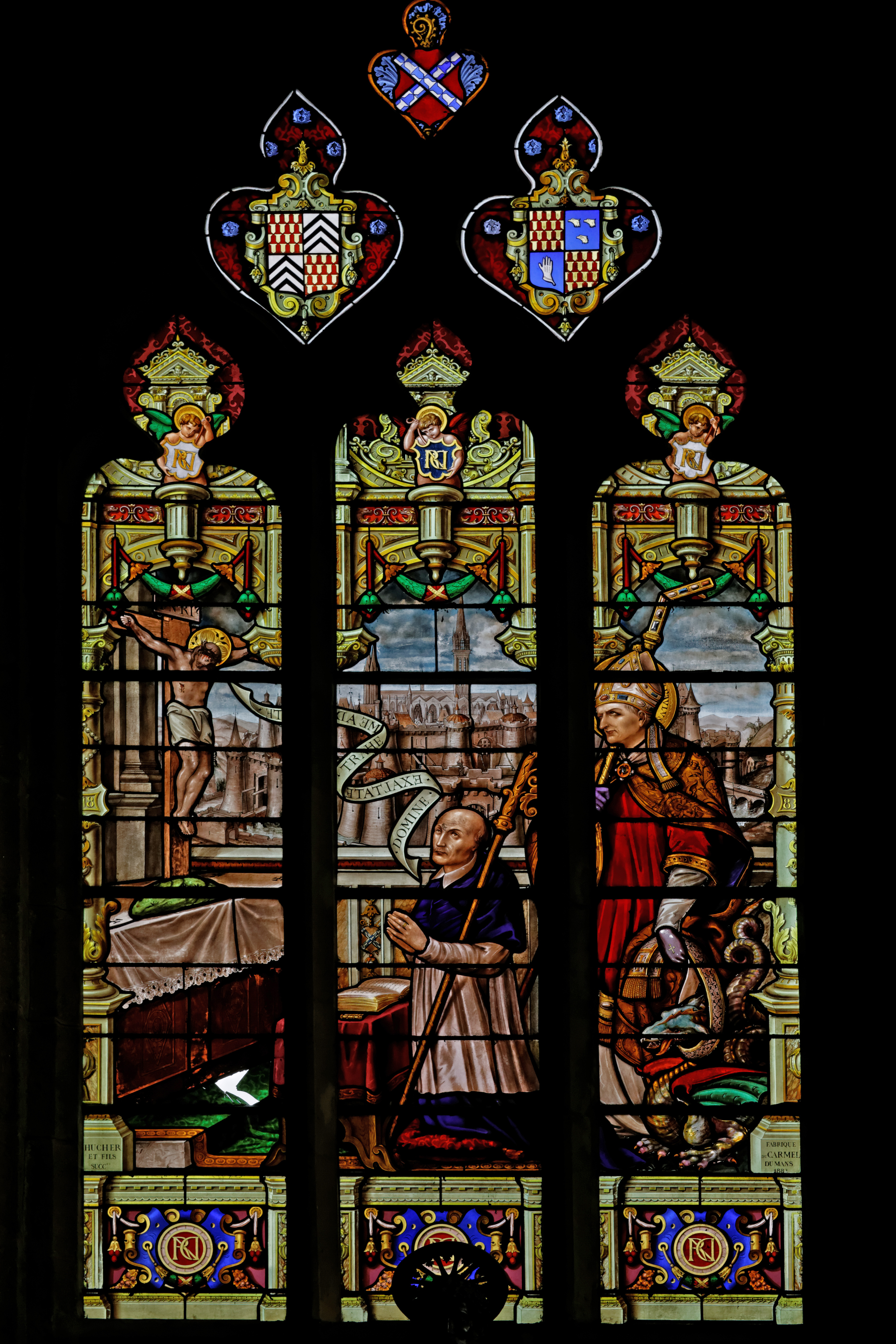 Vitrail de Hucher et Fils (Fabrique du Carmel du Mans) daté de 1883 dans la cathédrale Saint-Paul-Aurélien de Saint-Pol-de-Léon. Il s'agit d'une représentation de Mgr. de Neufville, d'après une enluminure d'un missel conservé à Lyon.